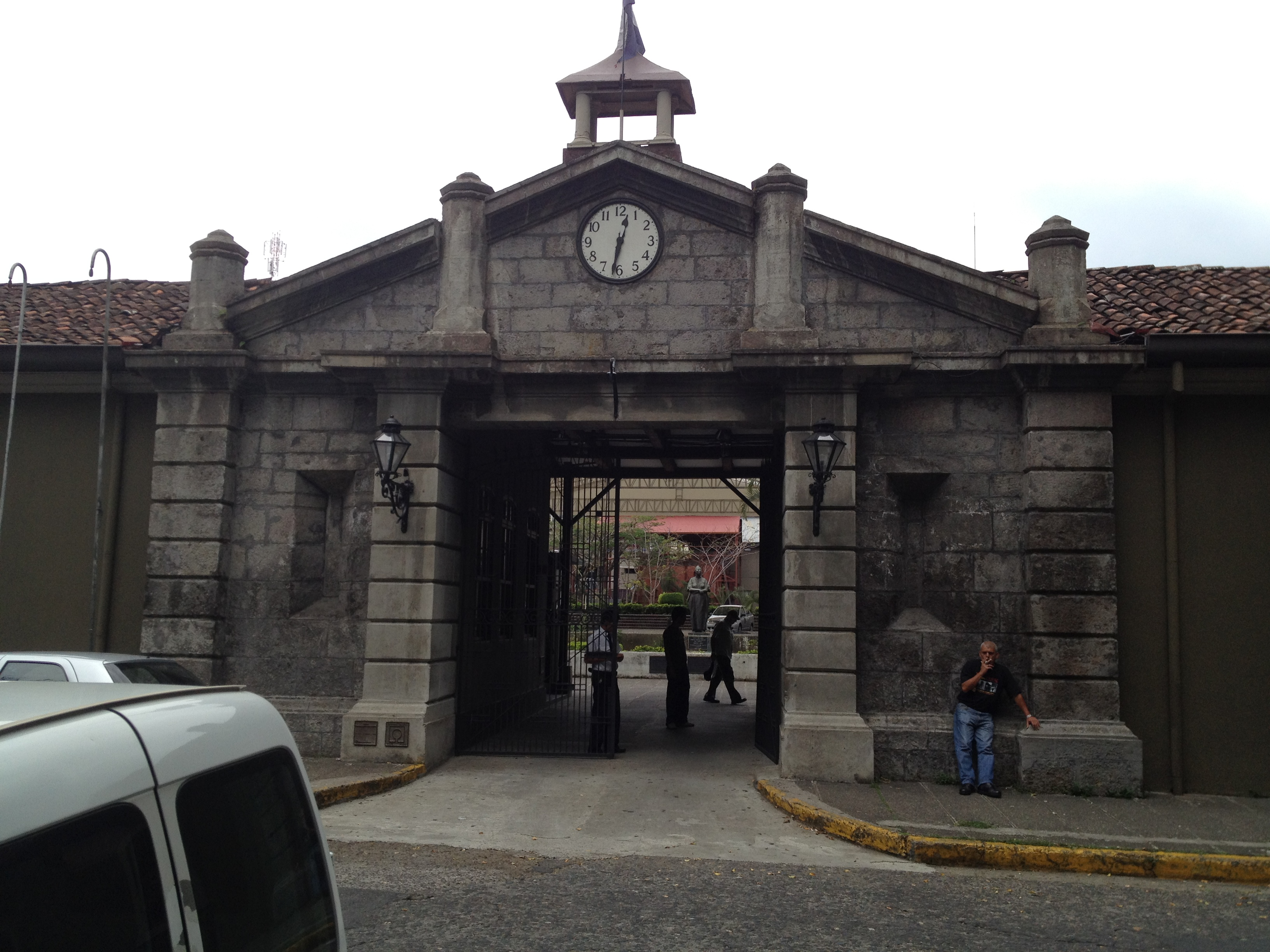 Centro Nacional de la Cultura (antigua Fábrica de Licores) en San José, Costa Rica.